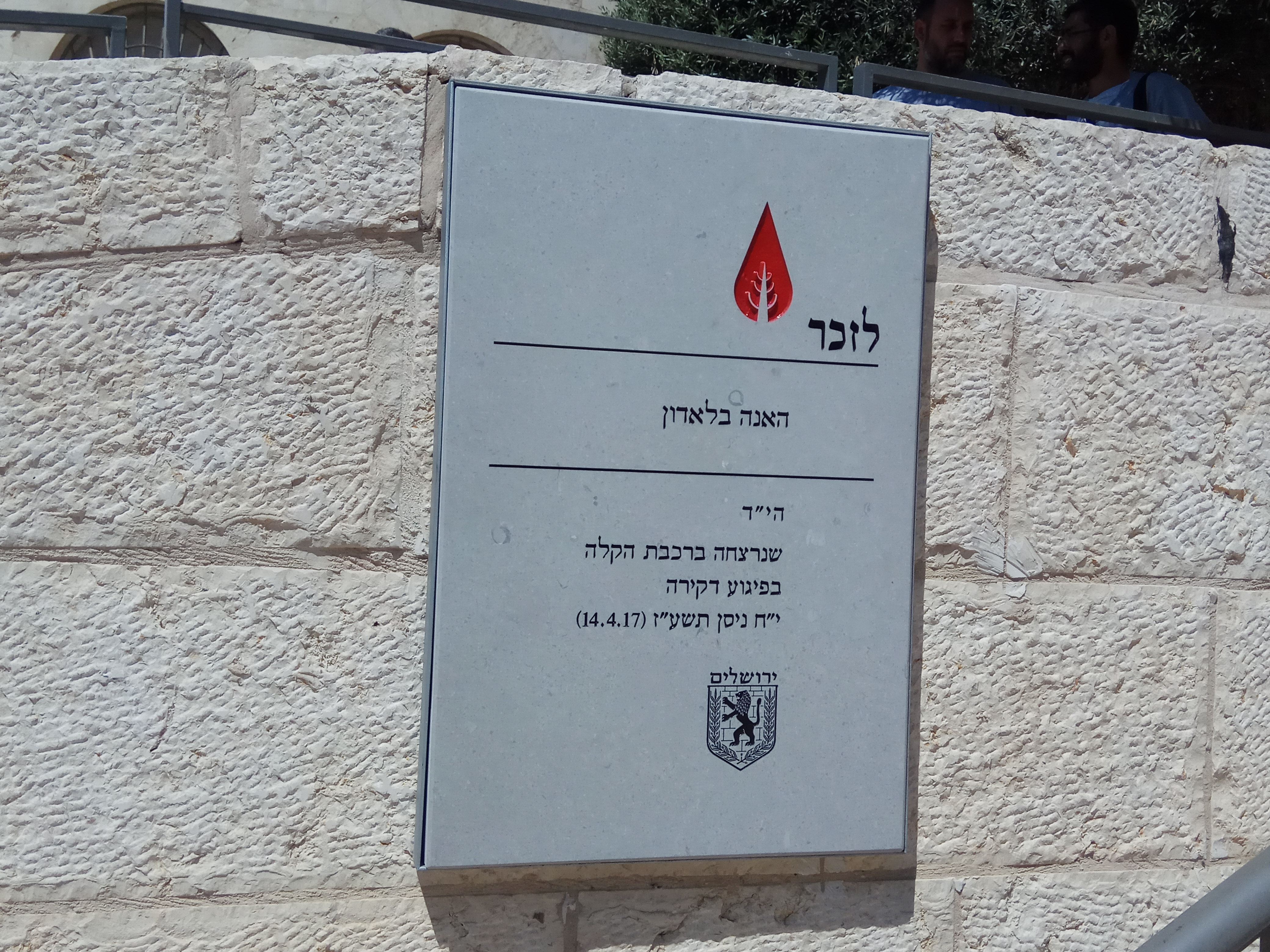 לוחית זיכרון בכיכר צה"ל בירושלים לתיירת האנה בלאדון שנרצחה בפיגוע דקירה ברכבת הקלה ב-14/4/17